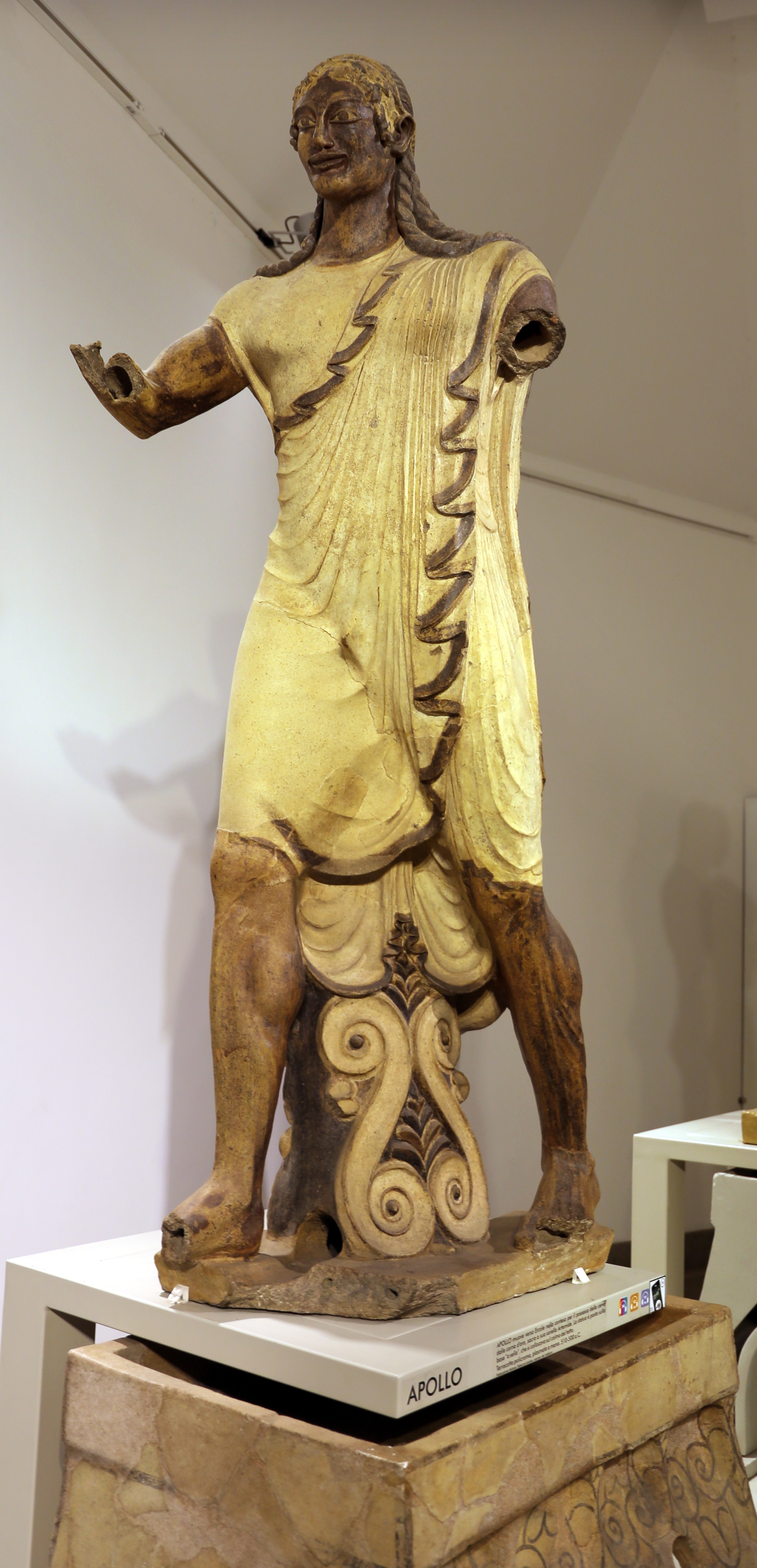 Museo nazionale etrusco di Villa Giulia This is a photo of a monument which is part of cultural heritage of Italy.